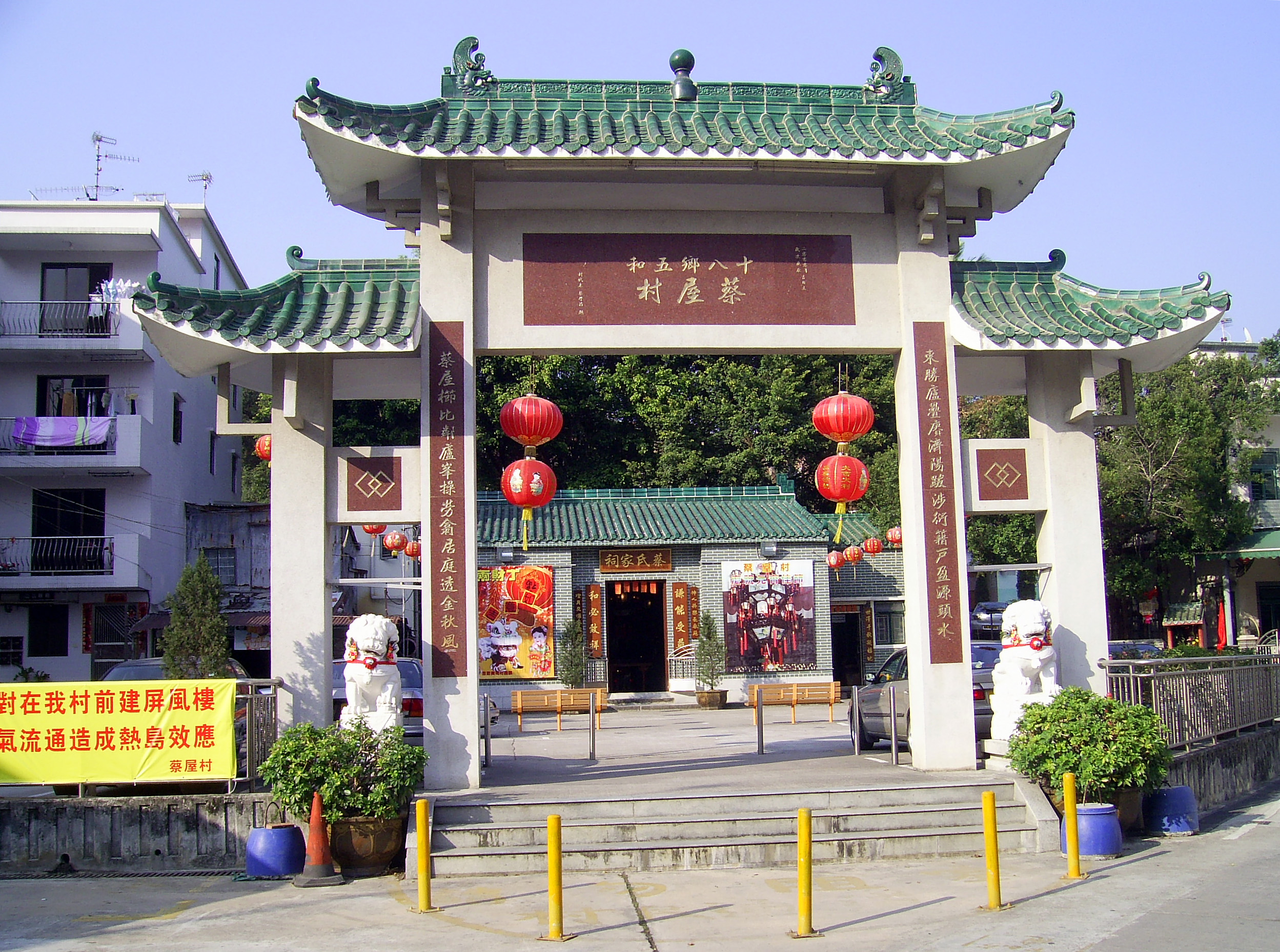 中文（香港）: 蔡屋村牌樓